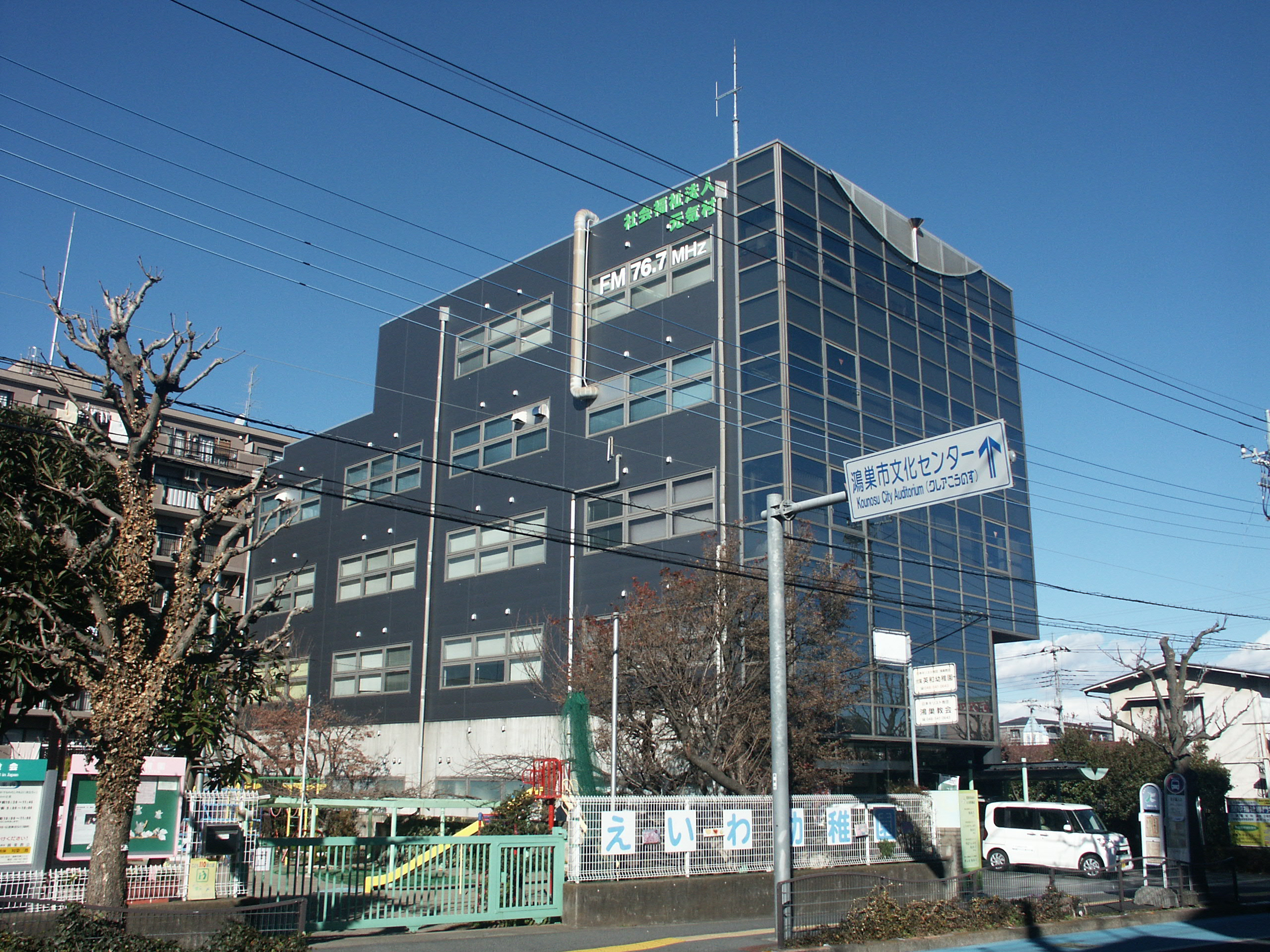 埼玉県鴻巣市に所在するフラワーコミュニティー放送本社